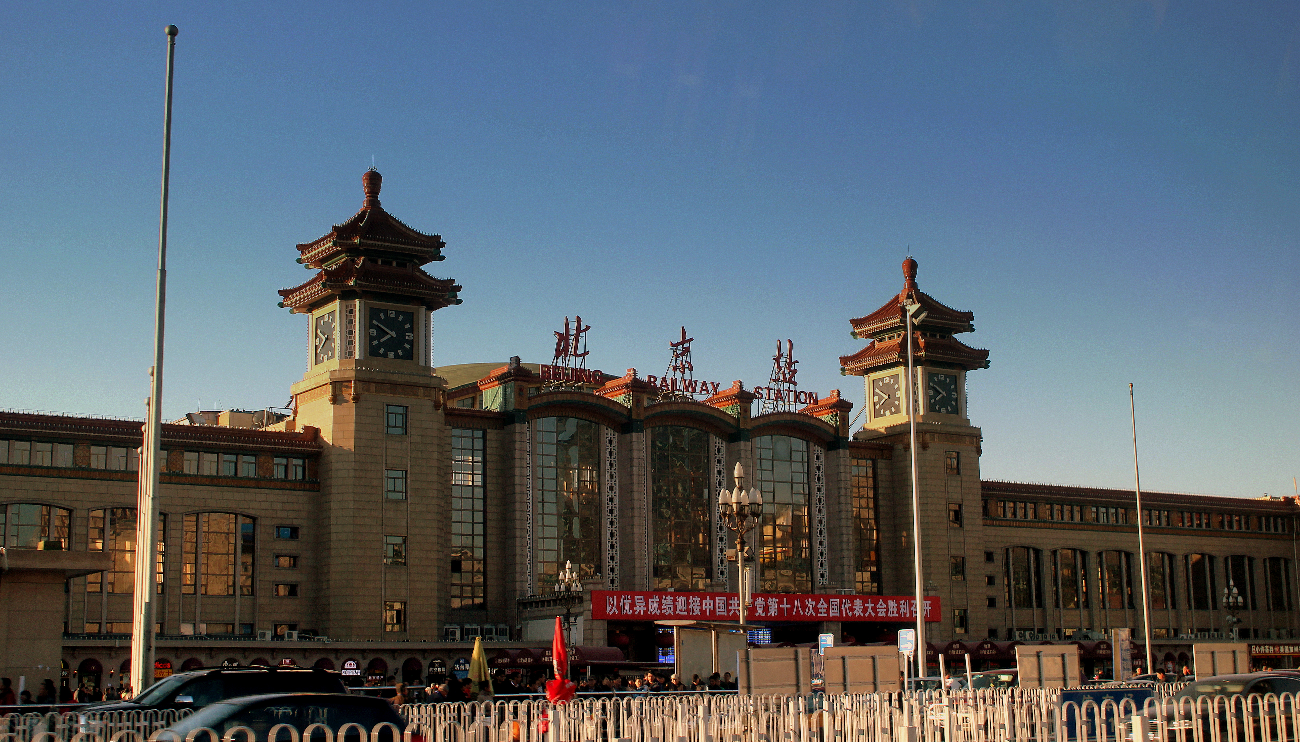 BEIJING RAILWAY STATION CHINA OCT 2012